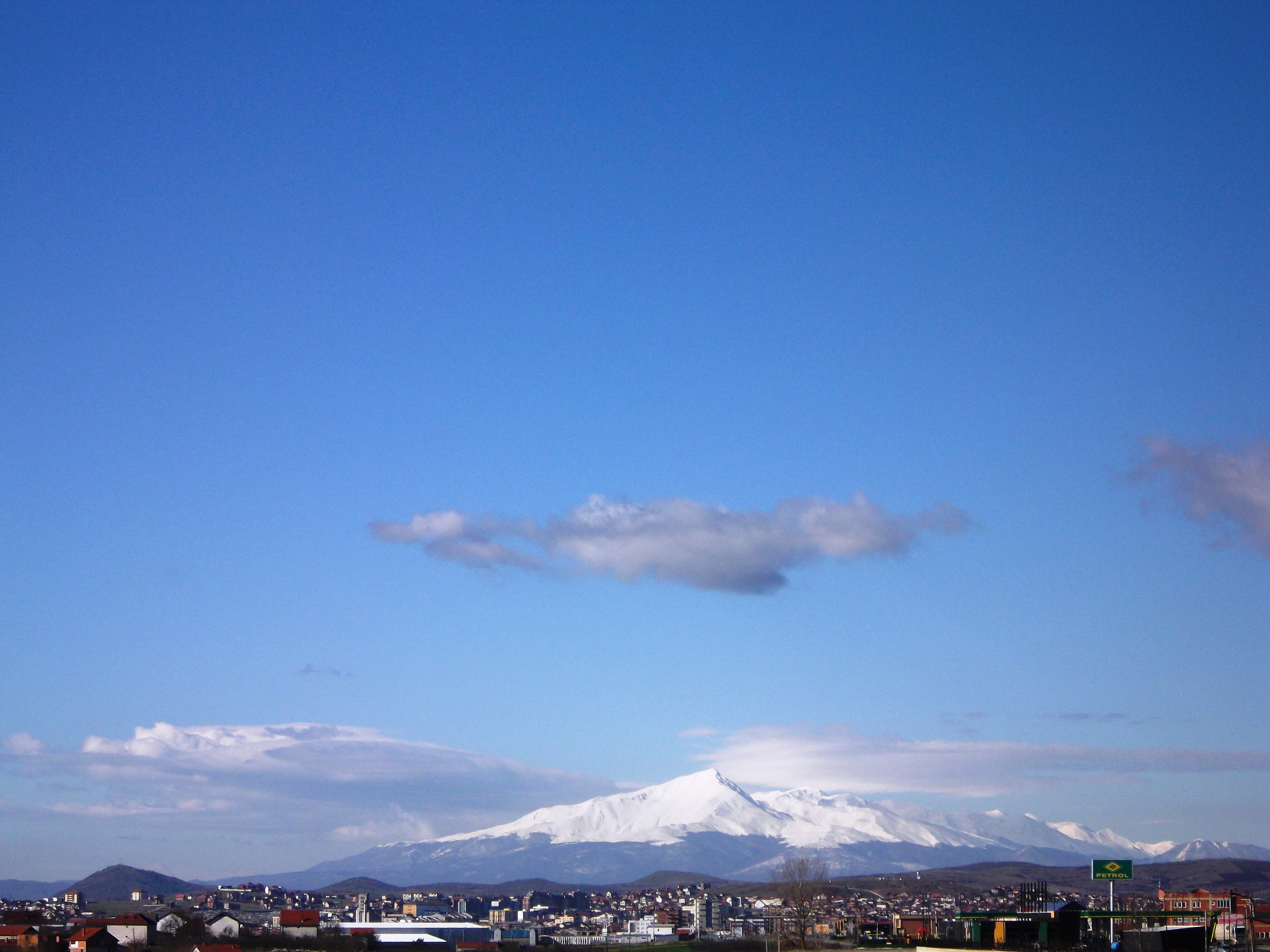 Pamje e Maës së Lubotenit të Sharrit nga Shillova e Gjilanit